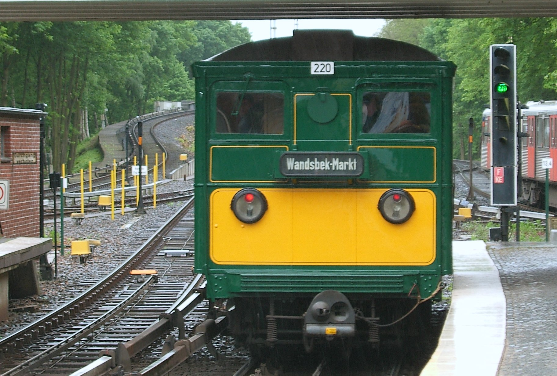 Historischer U-Bahn-Wagen T220 (erstes Baujahr 1912) im Bahnhof Kellinghusenstraße in Eppendorf